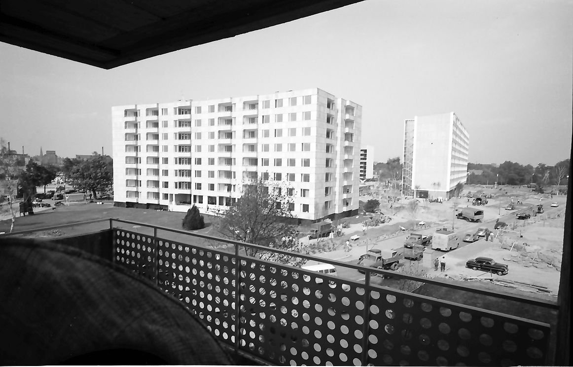 Berlin: Interbau; Ausblick aus Fenster Klopstockstraße 14-18 auf Objekt 16 (Klopstockstraße 30/32) und Objekt 15 (Schwedenhaus)